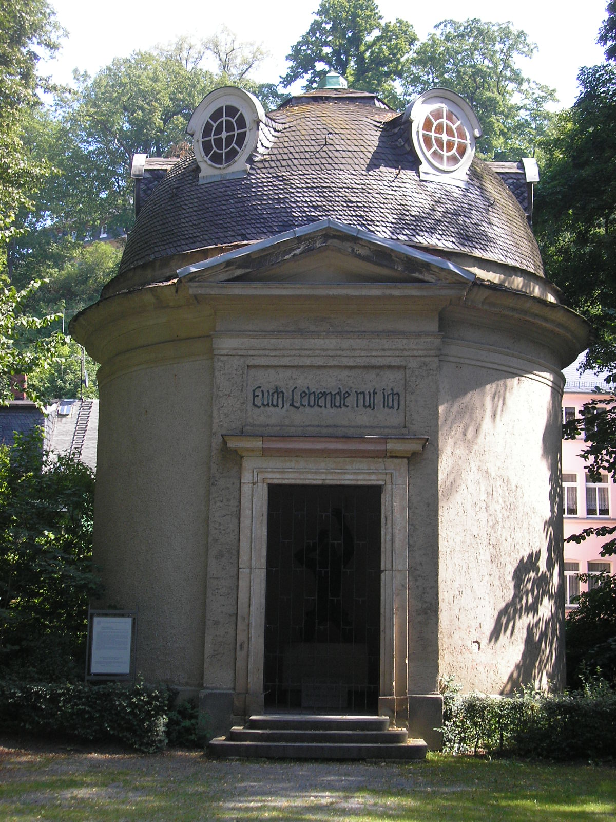 Die 1787 erbaute Rotunde im Greizer Park (Thüringen).